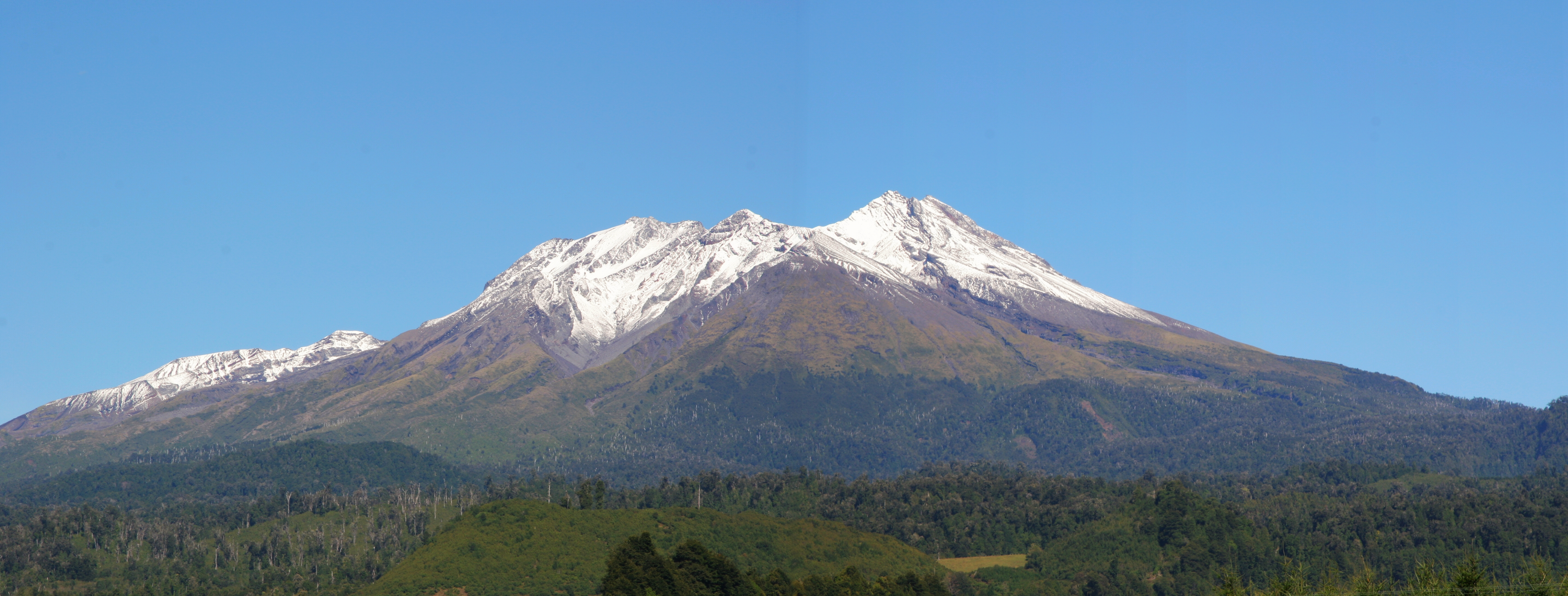 volcan Calbuco 2006 Chile